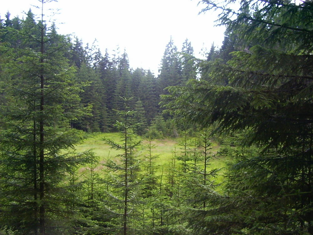 Der ueberwachsene Ursprungsteich